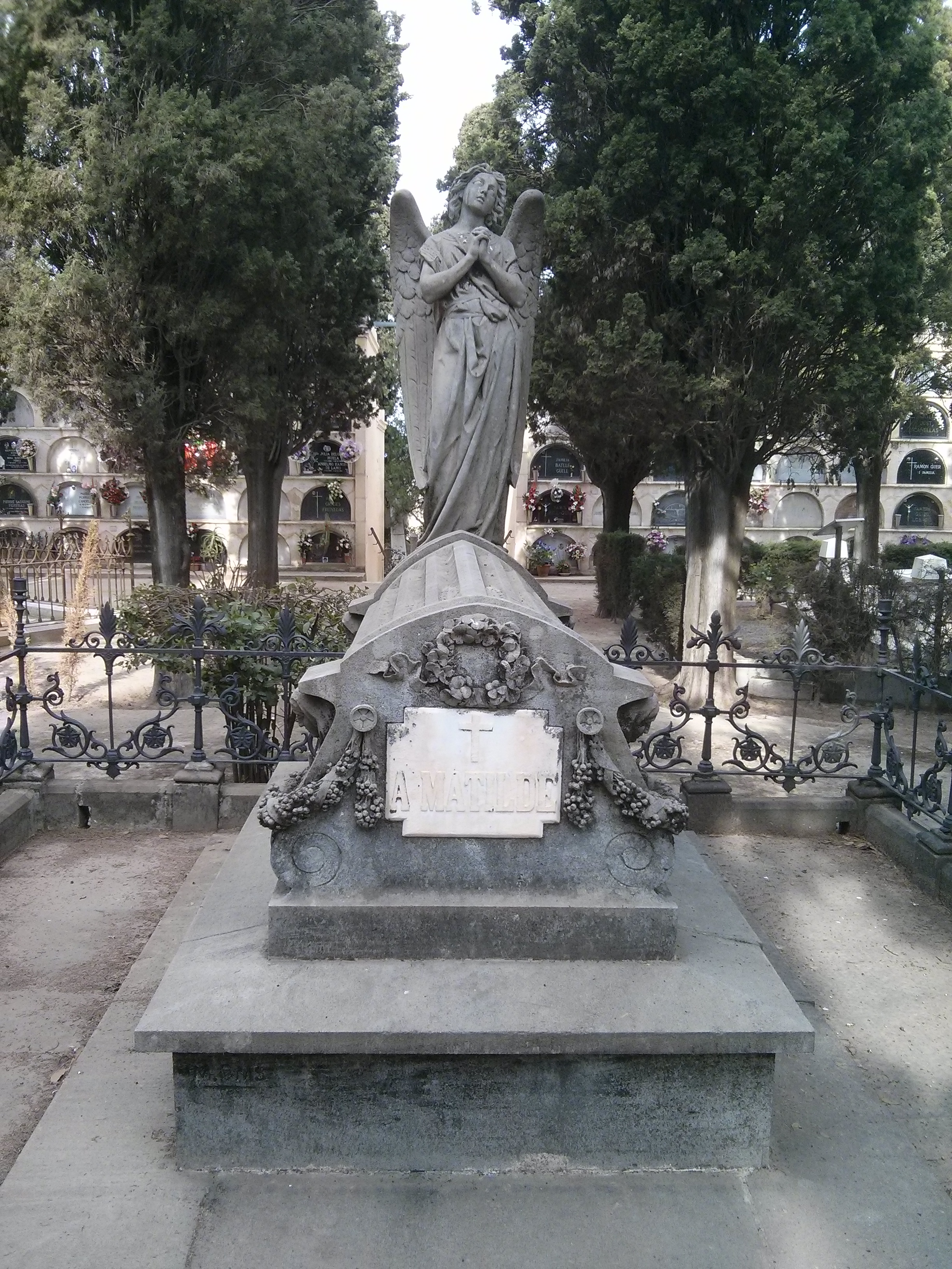 Tumba de Eugenio D'Ors en Vilafranca del Penedès